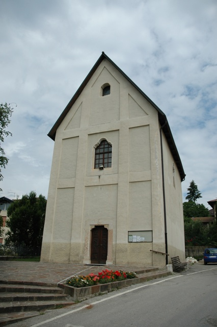 Chiesa di San Tomaso, Portolo (frazione di Nanno)